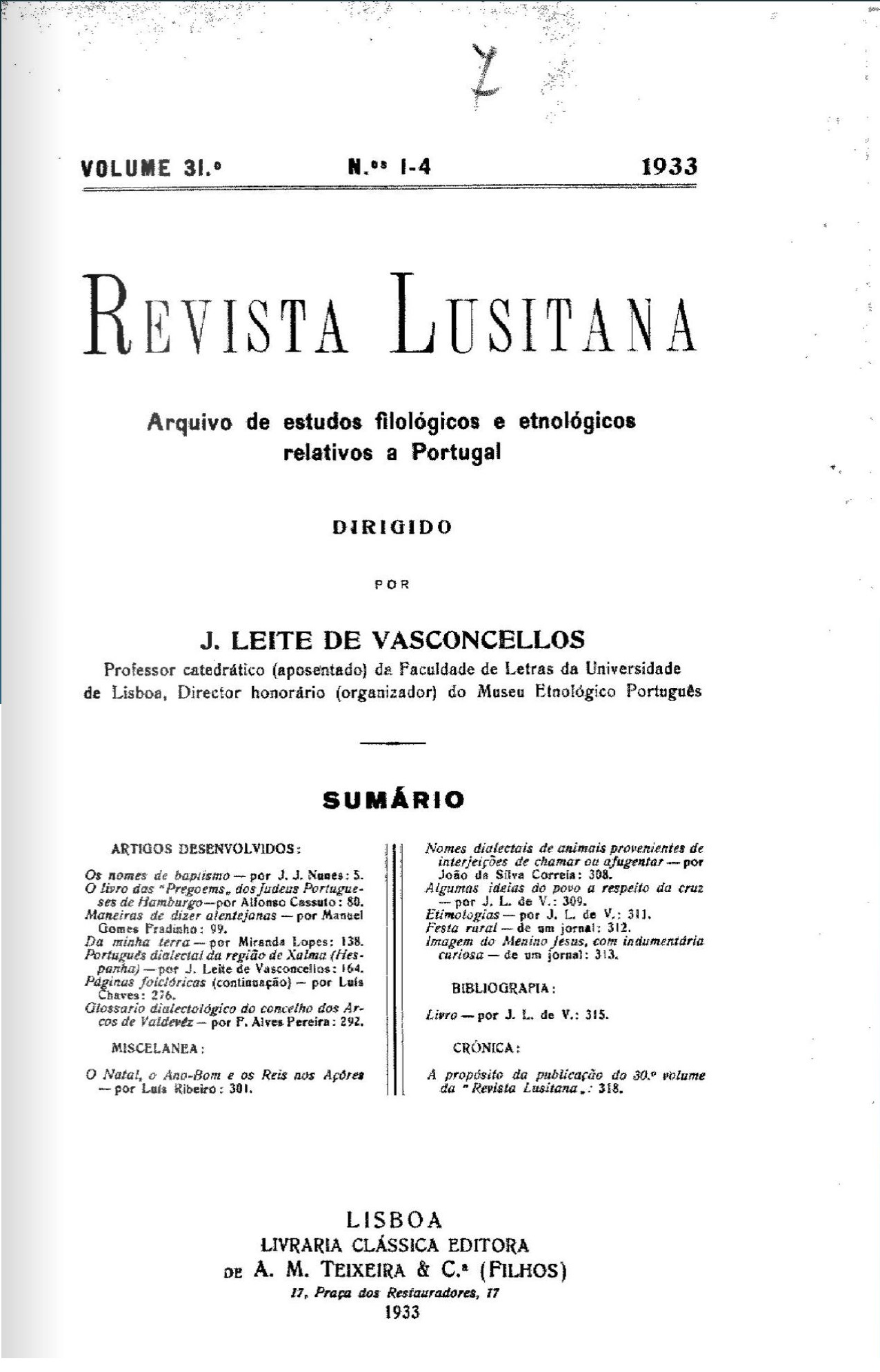 Revista Lusitana, volume 31 do 1933. Dirigida por José Leite de Vasconcelos